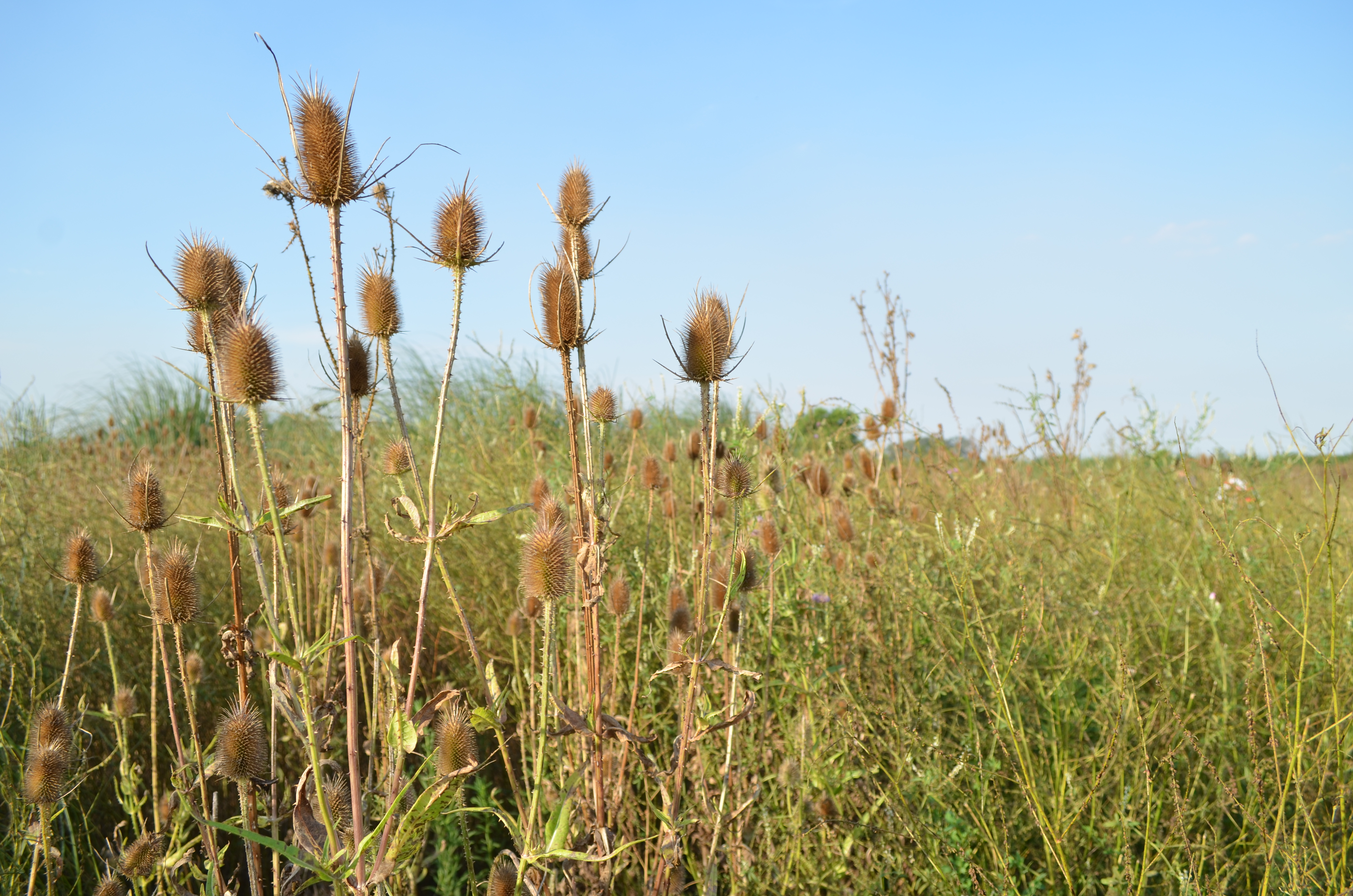 Pastizales en la Reserva Natural Laguna de Rocha